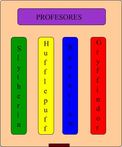 Gran Comedor de Harry Potter